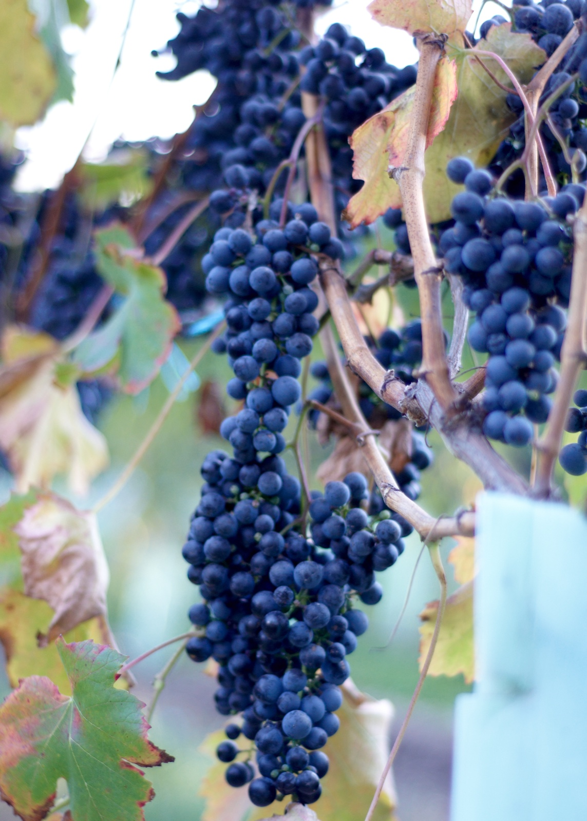 Lagrein vines growing in New Zealand